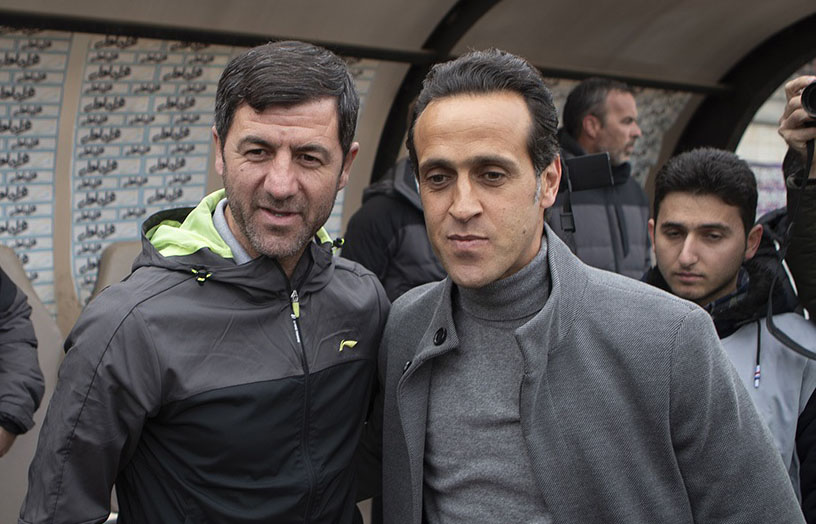 علی کریمی و کریم باقری - جام حذفی - پرسپولیس ۱- سپیدرود ۰- بهمن ۱۳۹۷